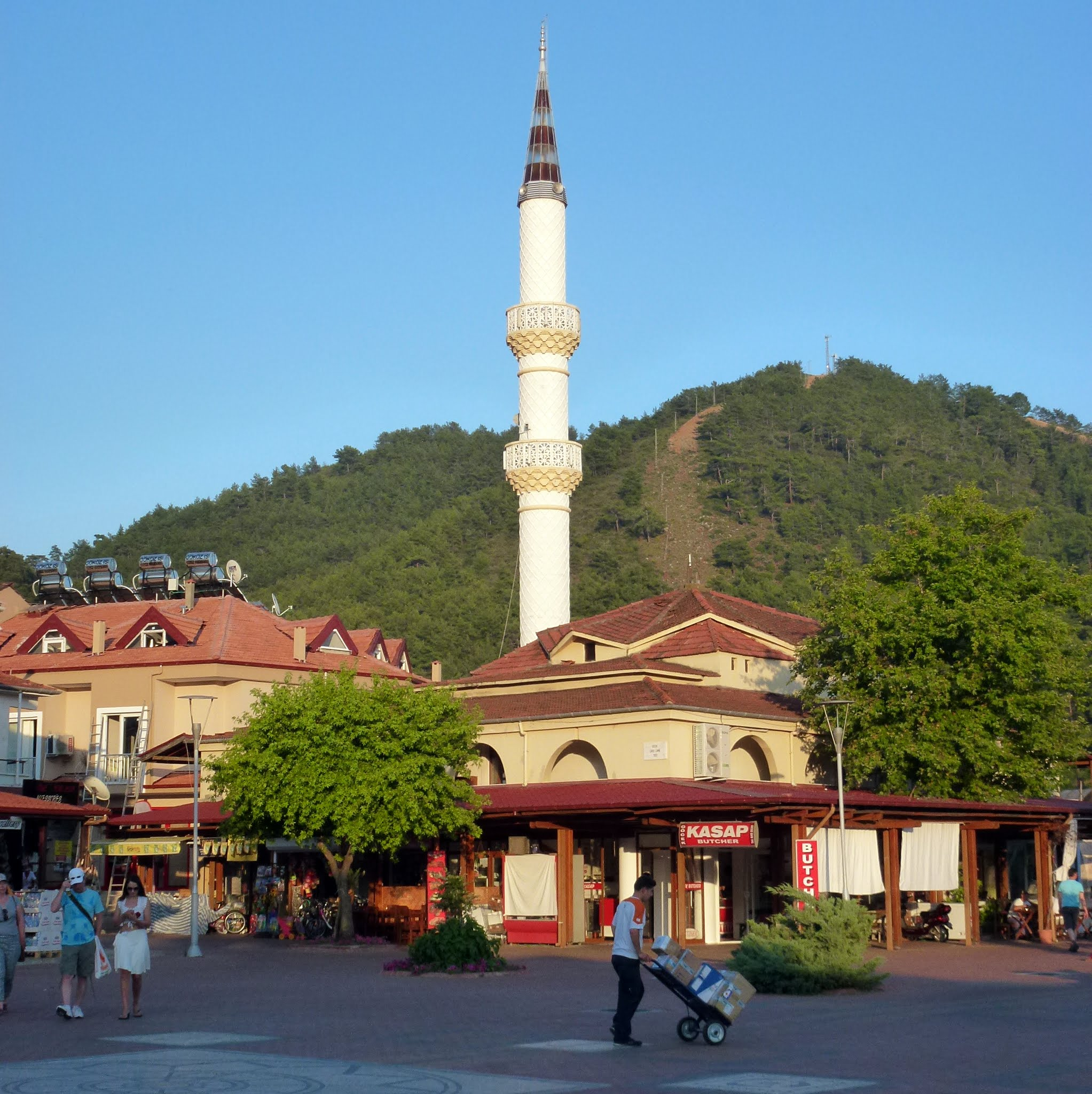 Göcek Camii